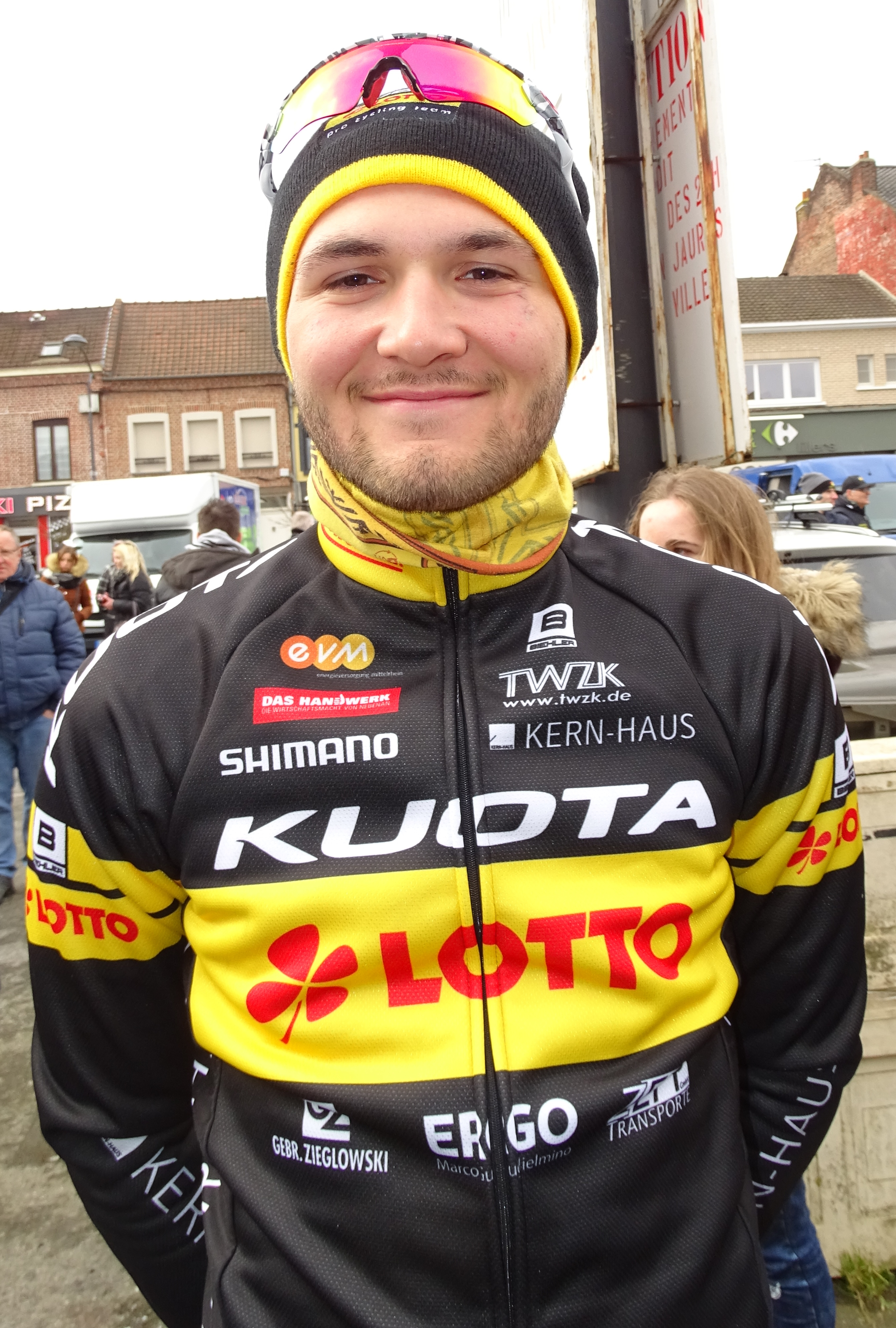 Reportage réalisé le dimanche 6 mars à l'occasion du départ et de l'arrivée du Grand Prix de Lillers-Souvenir Bruno Comini 2016 à Lillers, Pas-de-Calais, Nord-Pas-de-Calais, France.